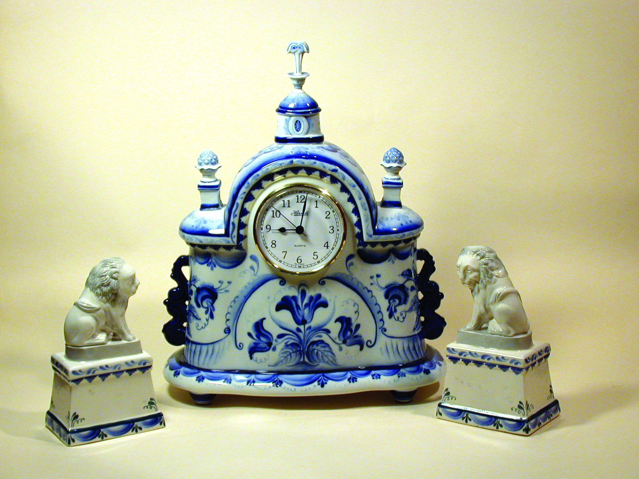 Часы "Кусково"Фарфор.2002 г.